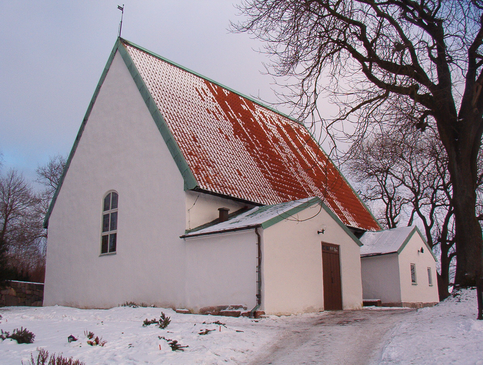 Lundby gamla kyrka Date January 2006